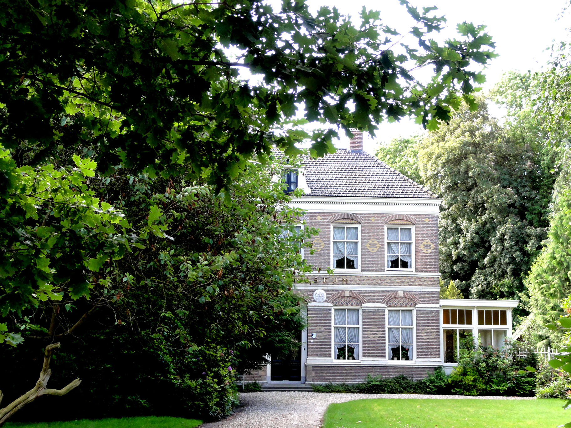 Voormalige Gerard Adriaan van Swieten Tuinbouwschool - Maatschappij van Weldadigheid - Majoor van Swietenlaan 17 Frederiksoord - rijksmonument